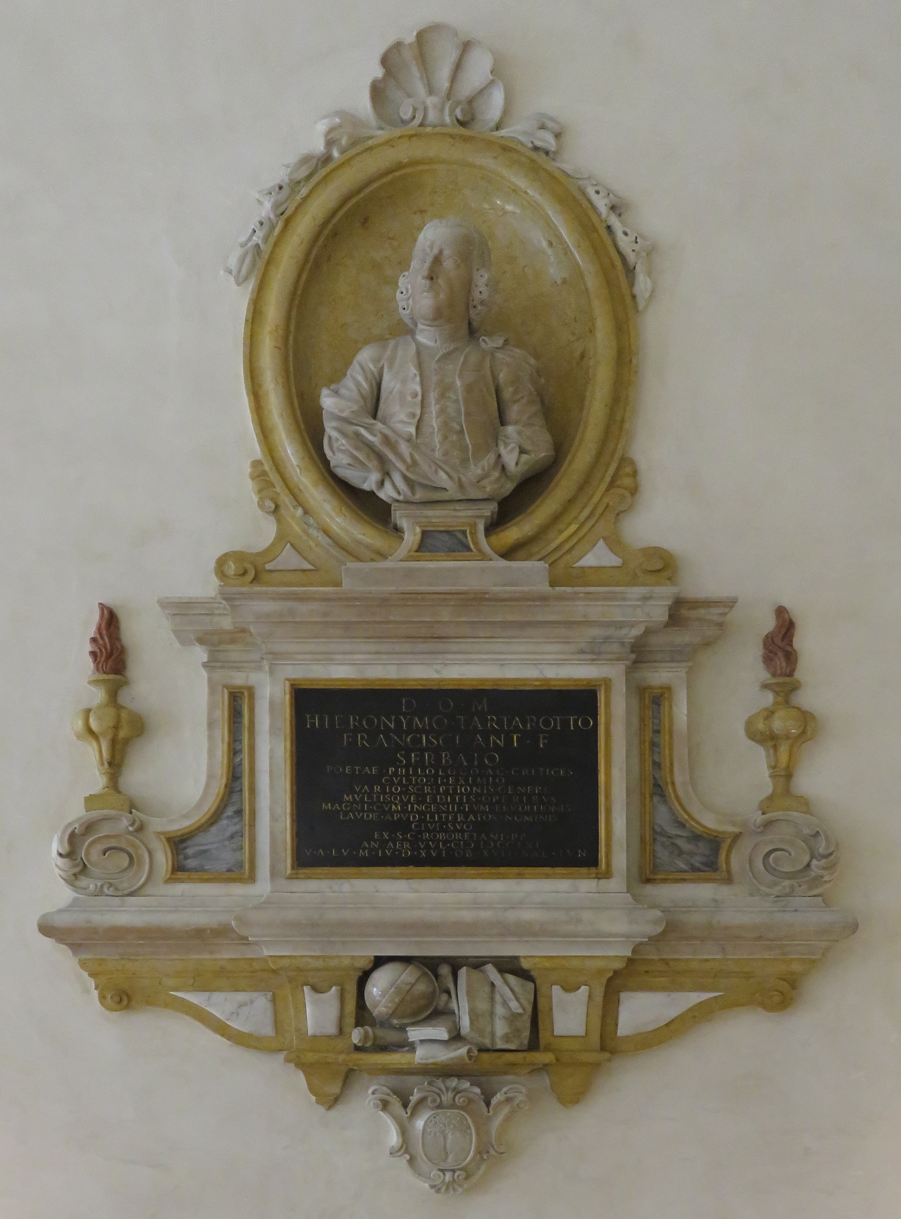 Monumento a Girolamo Tartarotti, opera di Francesco Tomezzoli. Atrio del Palazzo dell’Istruzione (o Palazzo Piomarta) Rovereto